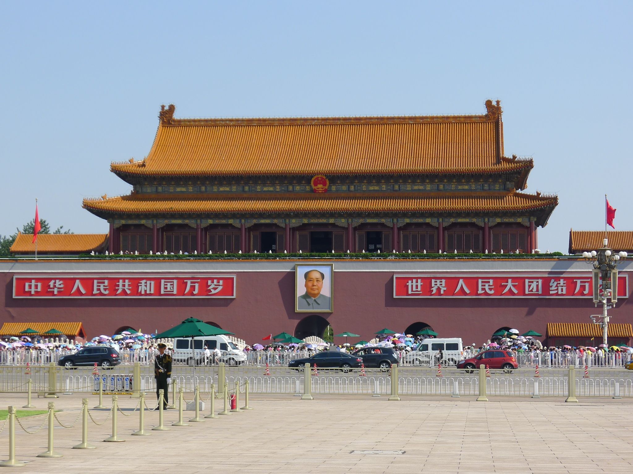 천안문, 중국 자금성 내성 남문인 천안문에 걸린 마오쩌뚱(모택동) 사진